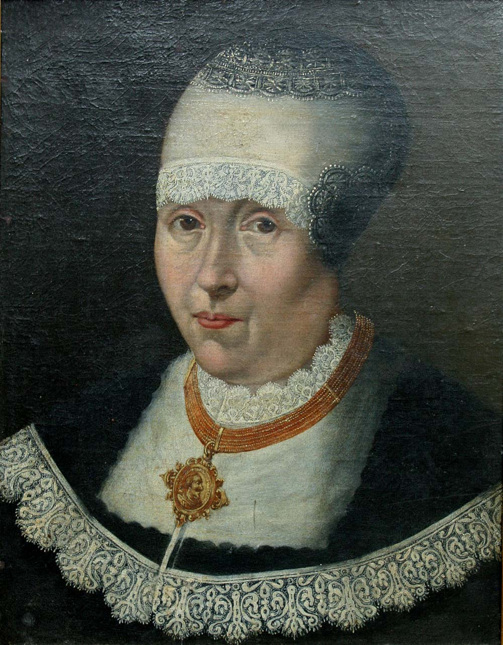 Maria Eleonora Königin von Schweden als Witwe von Gustav II. Adolf König von Schweden